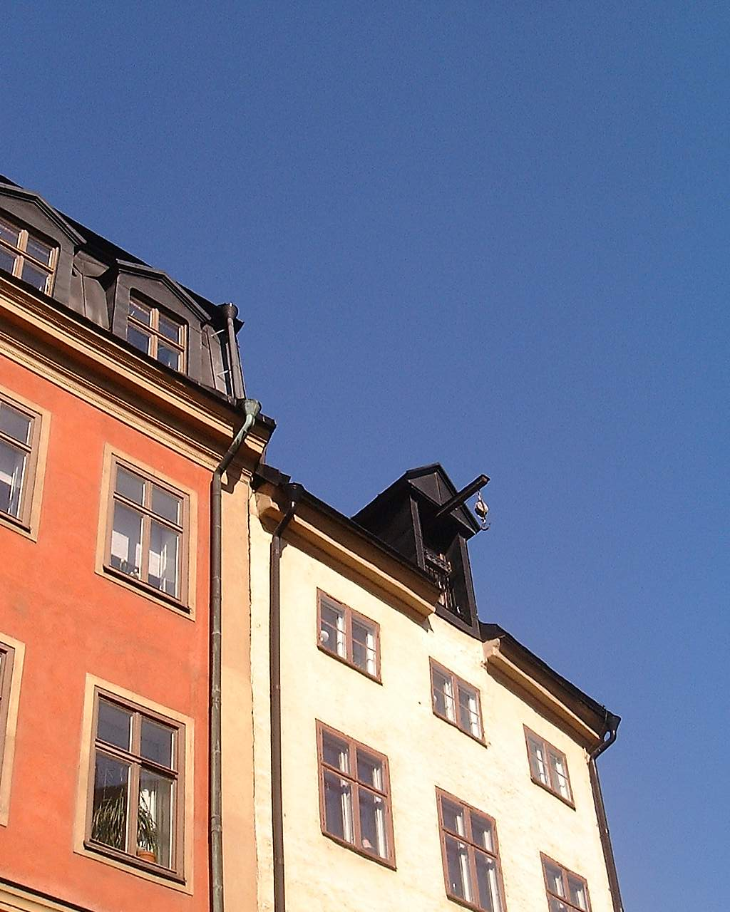 Old crane at Järntorget, Gamla stan, Stockholm.